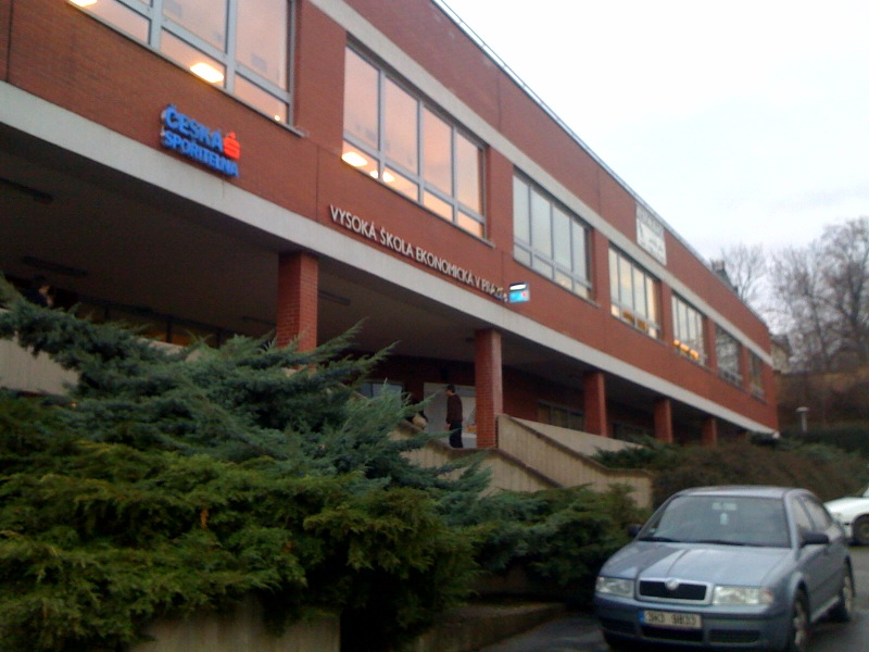 Rajská budova VŠE